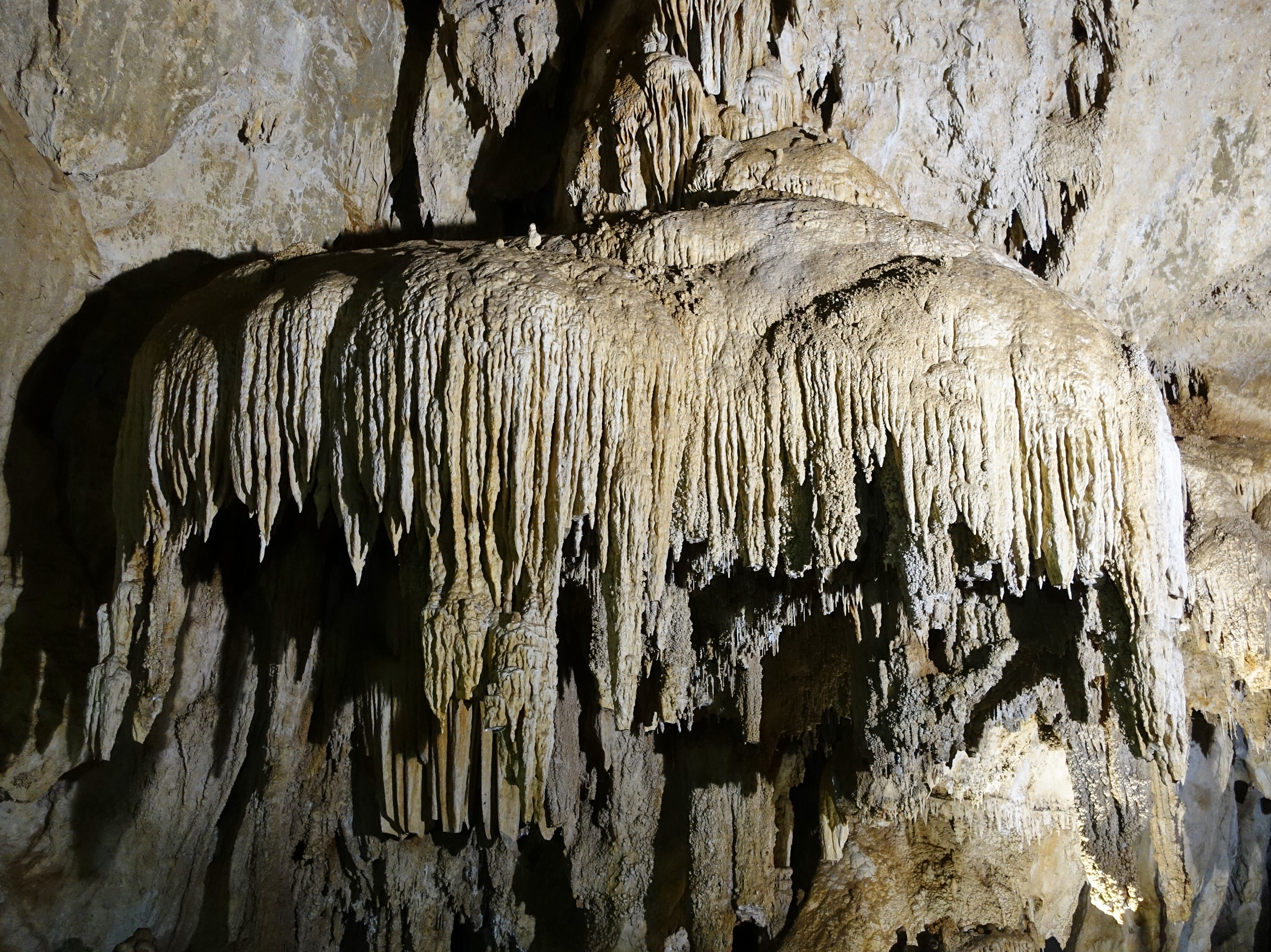 Grotte Is Zuddas, Gemeinde Santadi, Sardinien, Italien